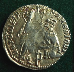 Ducato coniato dai Genovesi a Pera